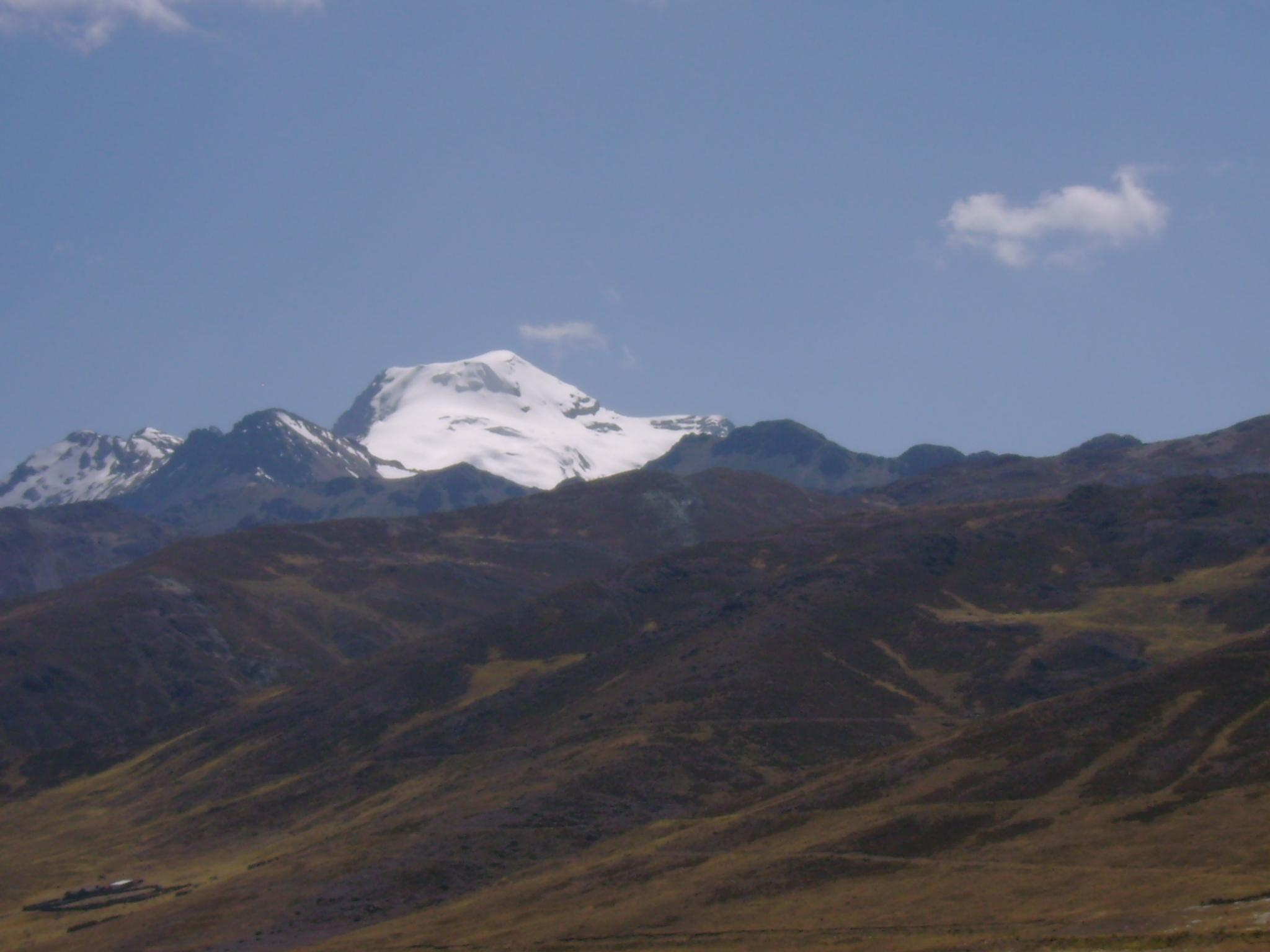 Nevado de Tuco, desde Conococha.